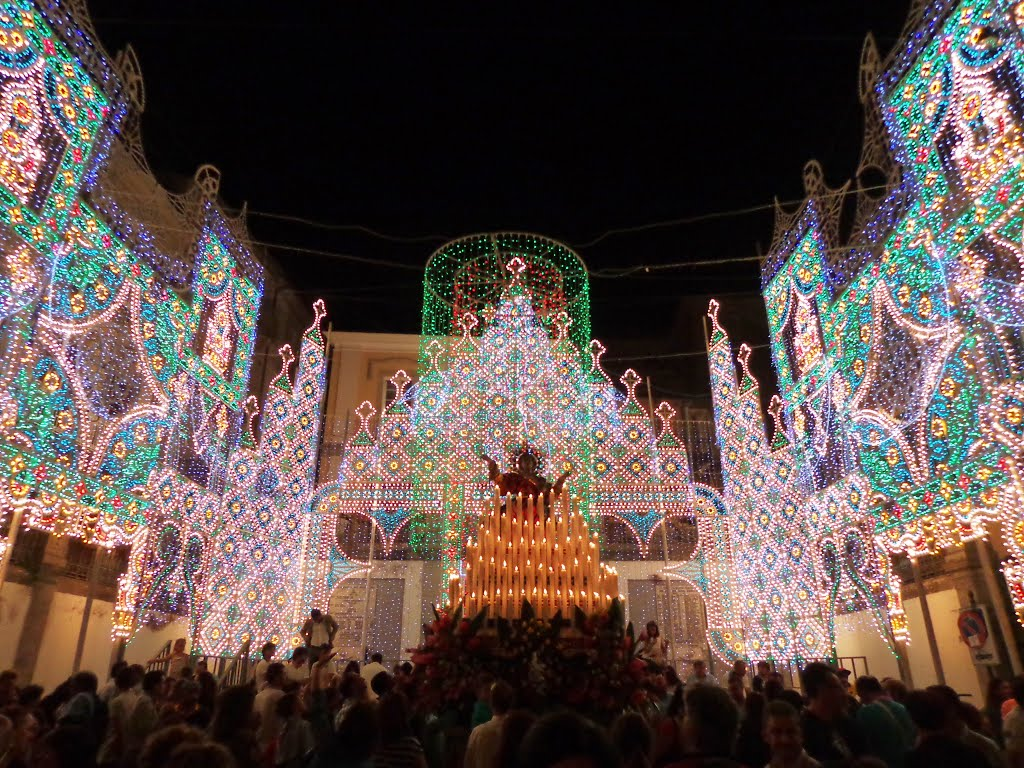 Assunzione agosto Novara di Sicilia